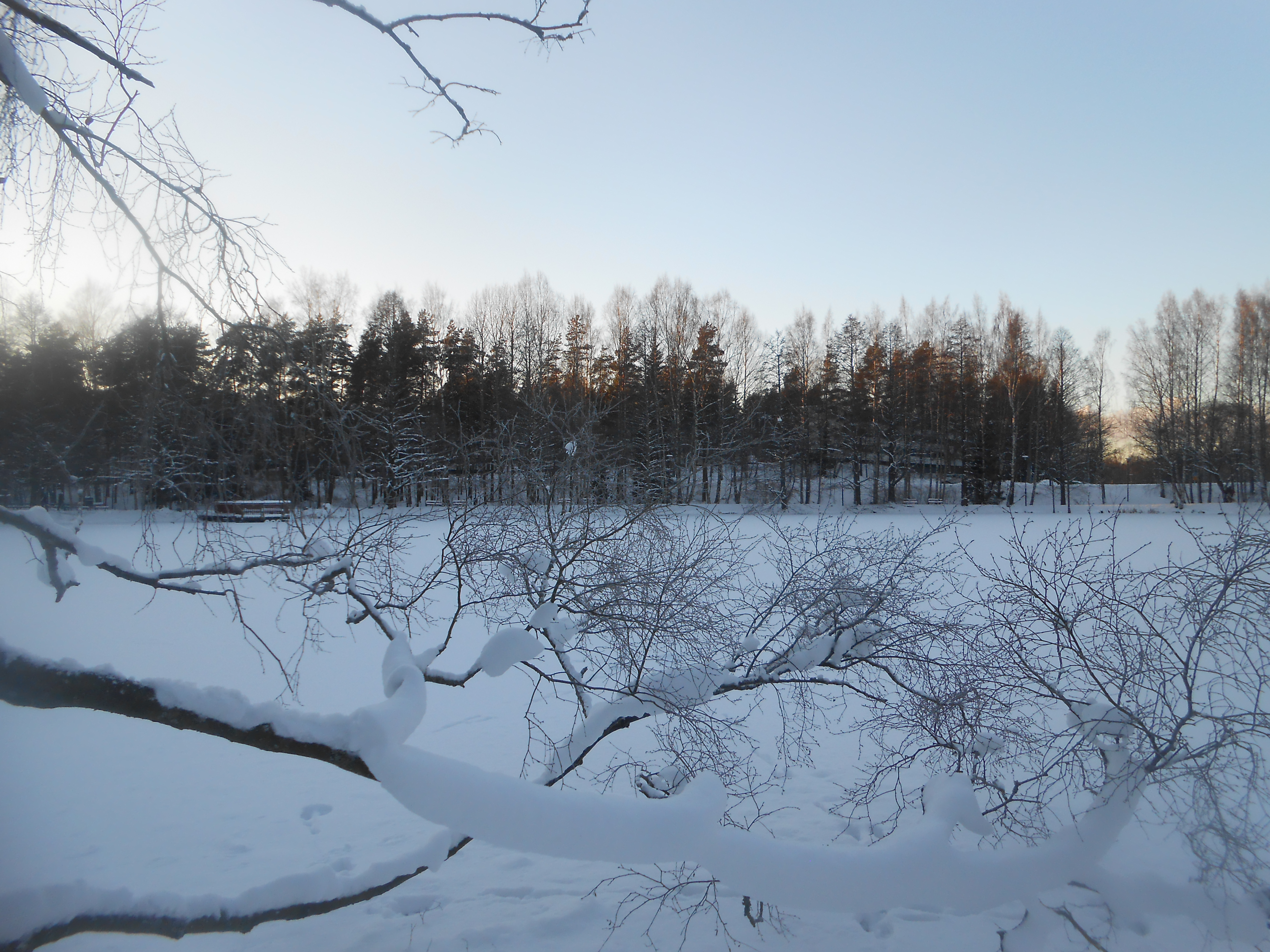 Kangaslampi talvella 2016.